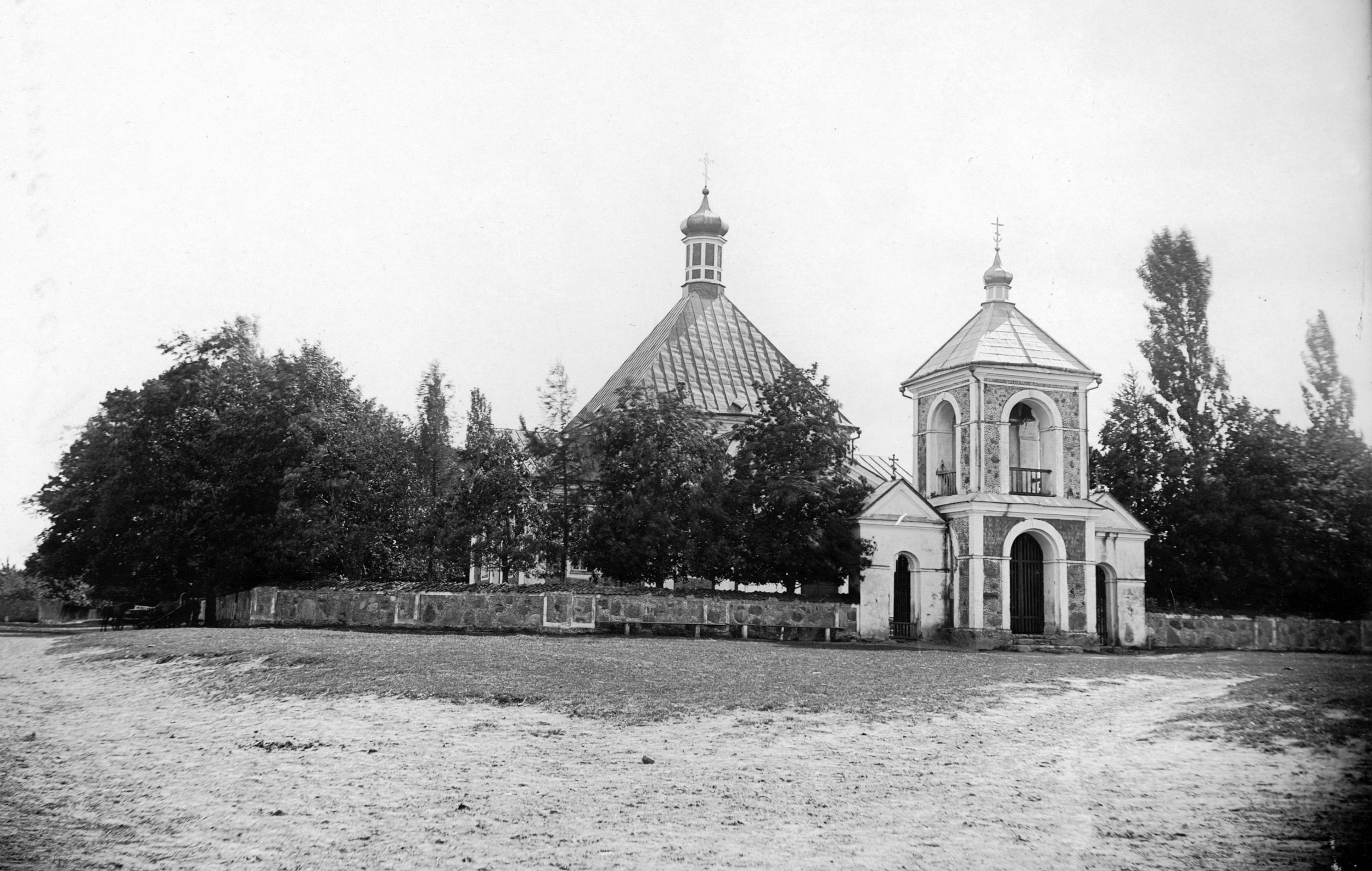 Беларуская (тарашкевіца): Ярэмічы (Jaremičy). Ушэсьценская царква